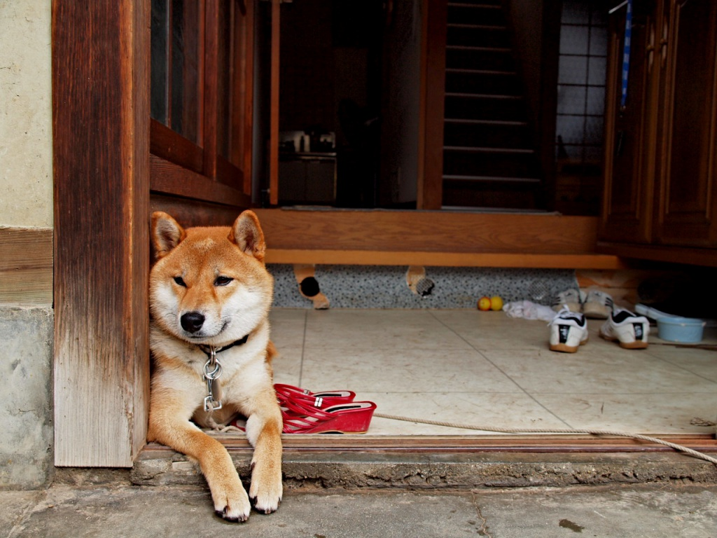 民家の玄関に伏せる柴犬「いっきゅう」。香川県にて。